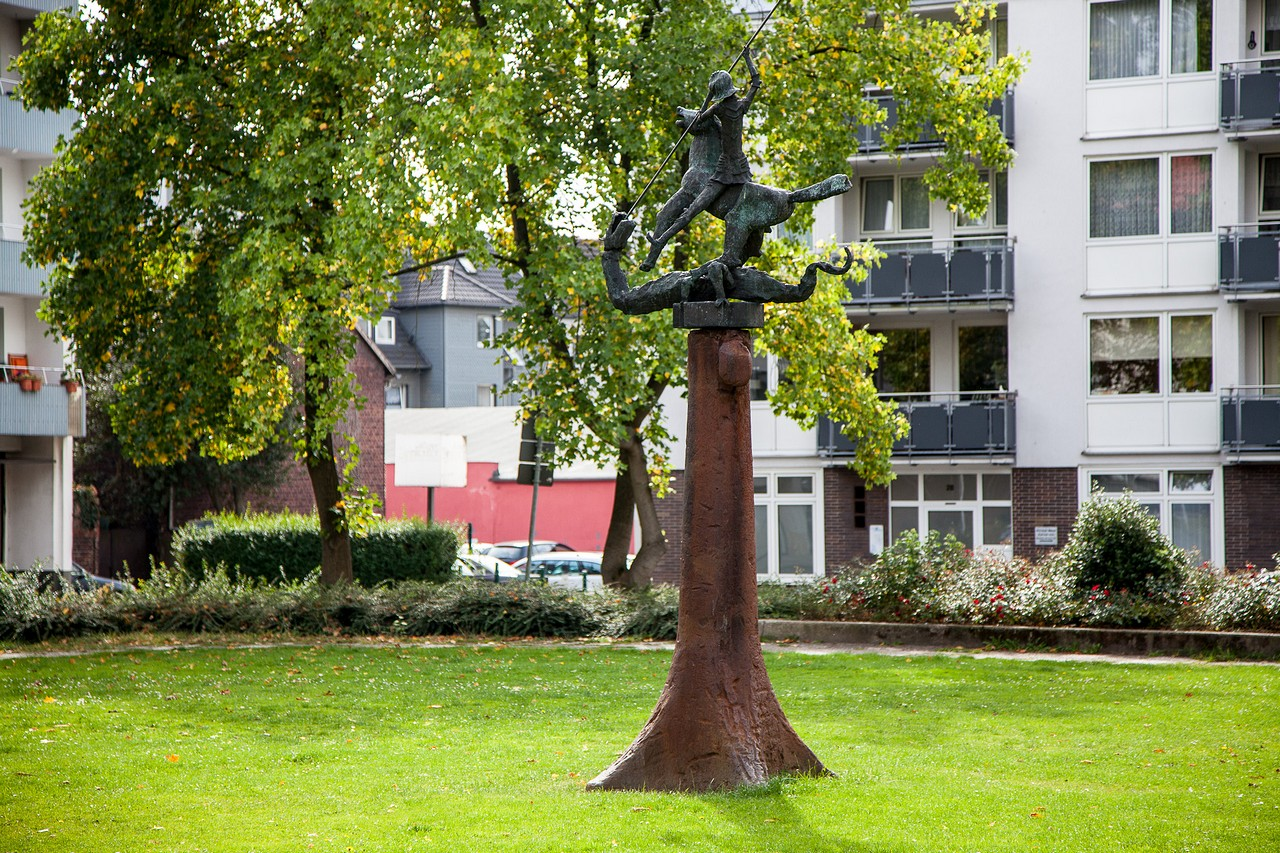 Die rund 4,50 m hohe Drachenbezwinger-Skulptur auf dem Rathausplatz Hattingen – St. Georg ist der Stadtpatron Hattingens; die 1990 vom Künstler Bernhard Kleinhans (1926–2004) gestaltete und von den Hattinger Rotariern gestiftete Skulptur hat als Sockel einen ausgemusterten Gießtrichter (von der Hattinger Henrichshütte, zuletzt von der VSG Energie- und Schmiedetechnik betrieben).